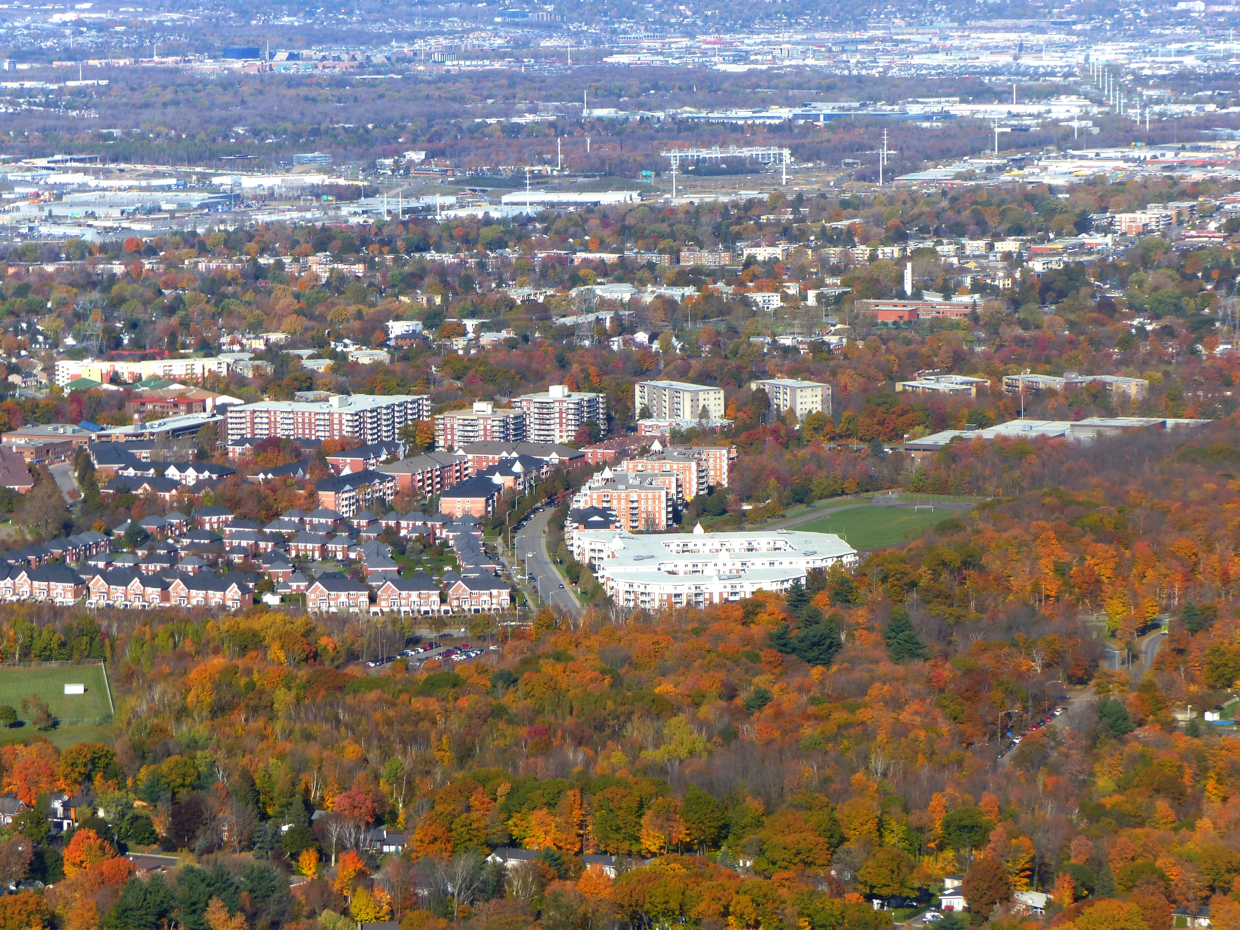 Québec City - Pointe-de-Sainte-Foy